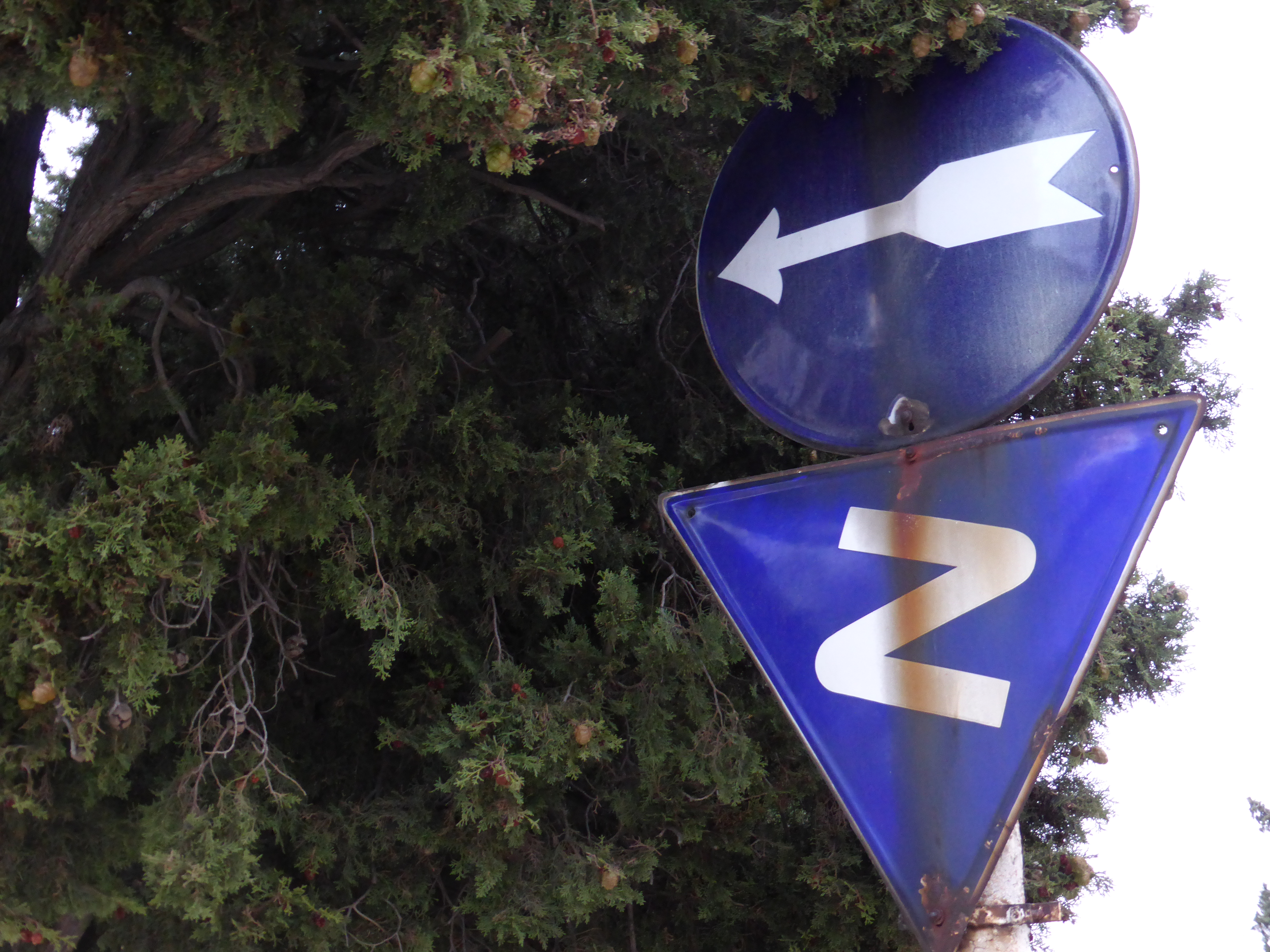 En la parte más antigua del cementerio de La Almudena, de Madrid, se encuentran estas antiguas señales de tráfico.